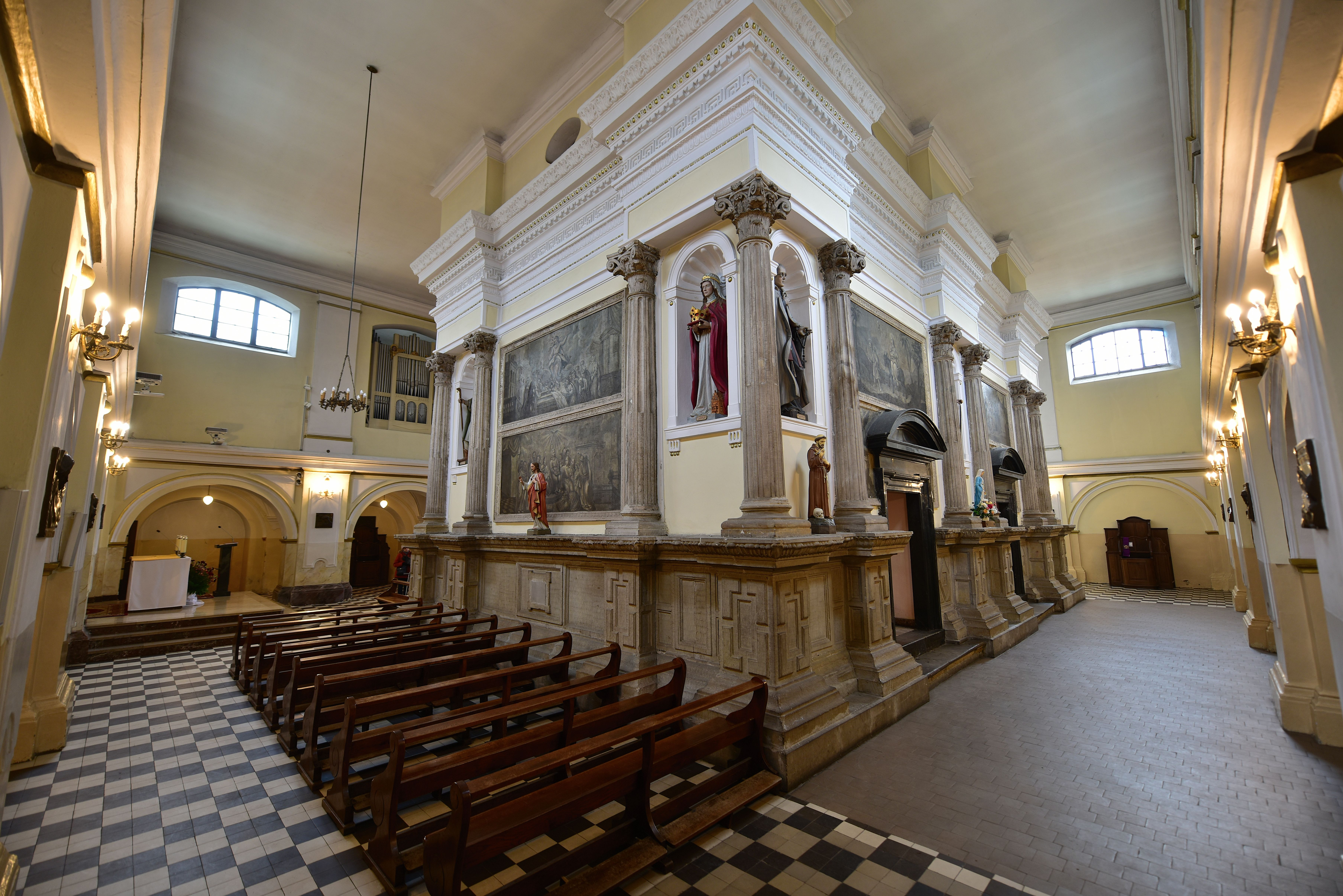 Domek loretański w kościele Matki Bożej Loretańskiej w Warszawie